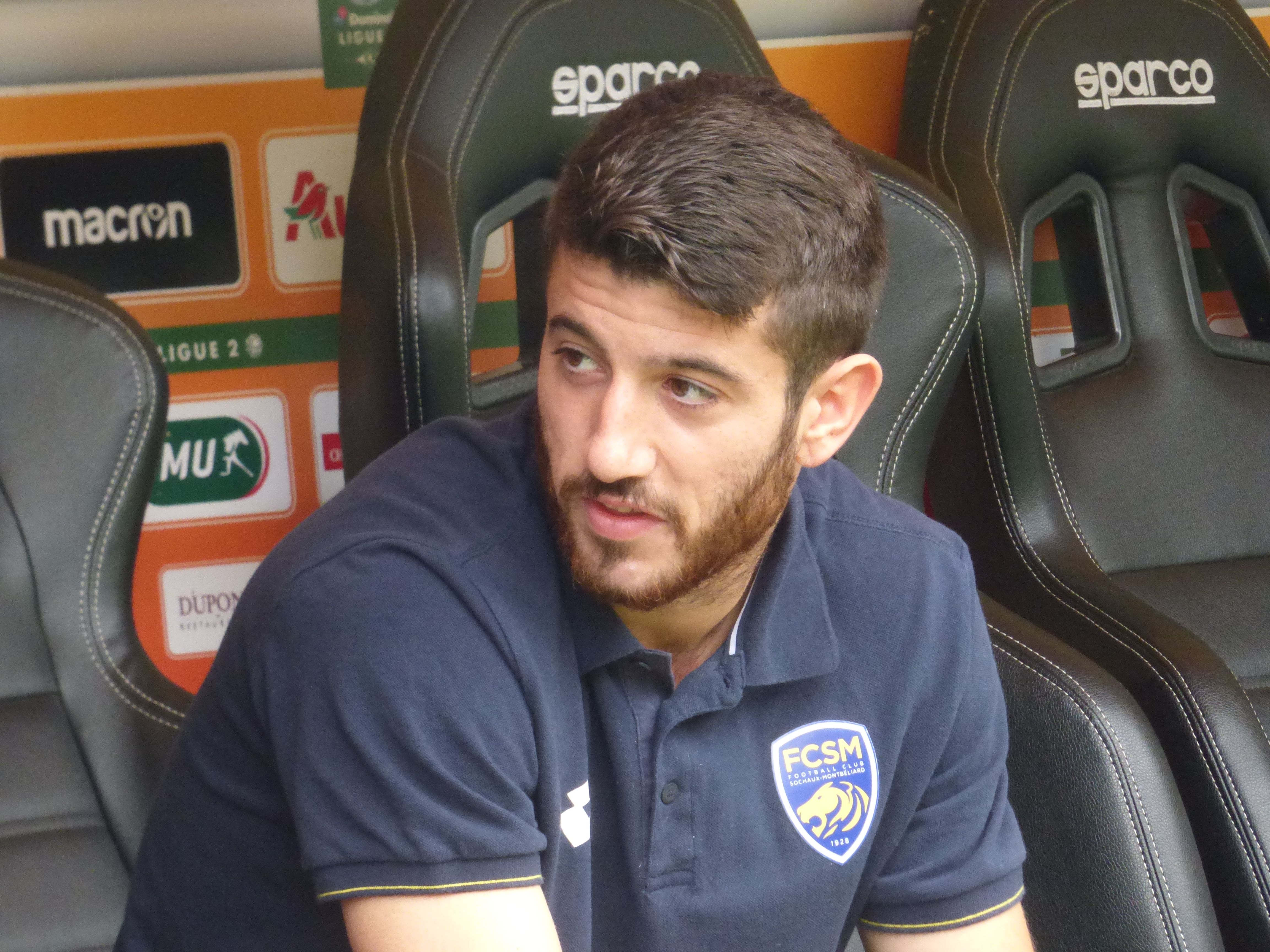 Nando (Fernando García Puchades) avant le match Lens / Sochaux, comptant pour la septième journée du championnat de France de football de Ligue 2, le 15 septembre 2018.